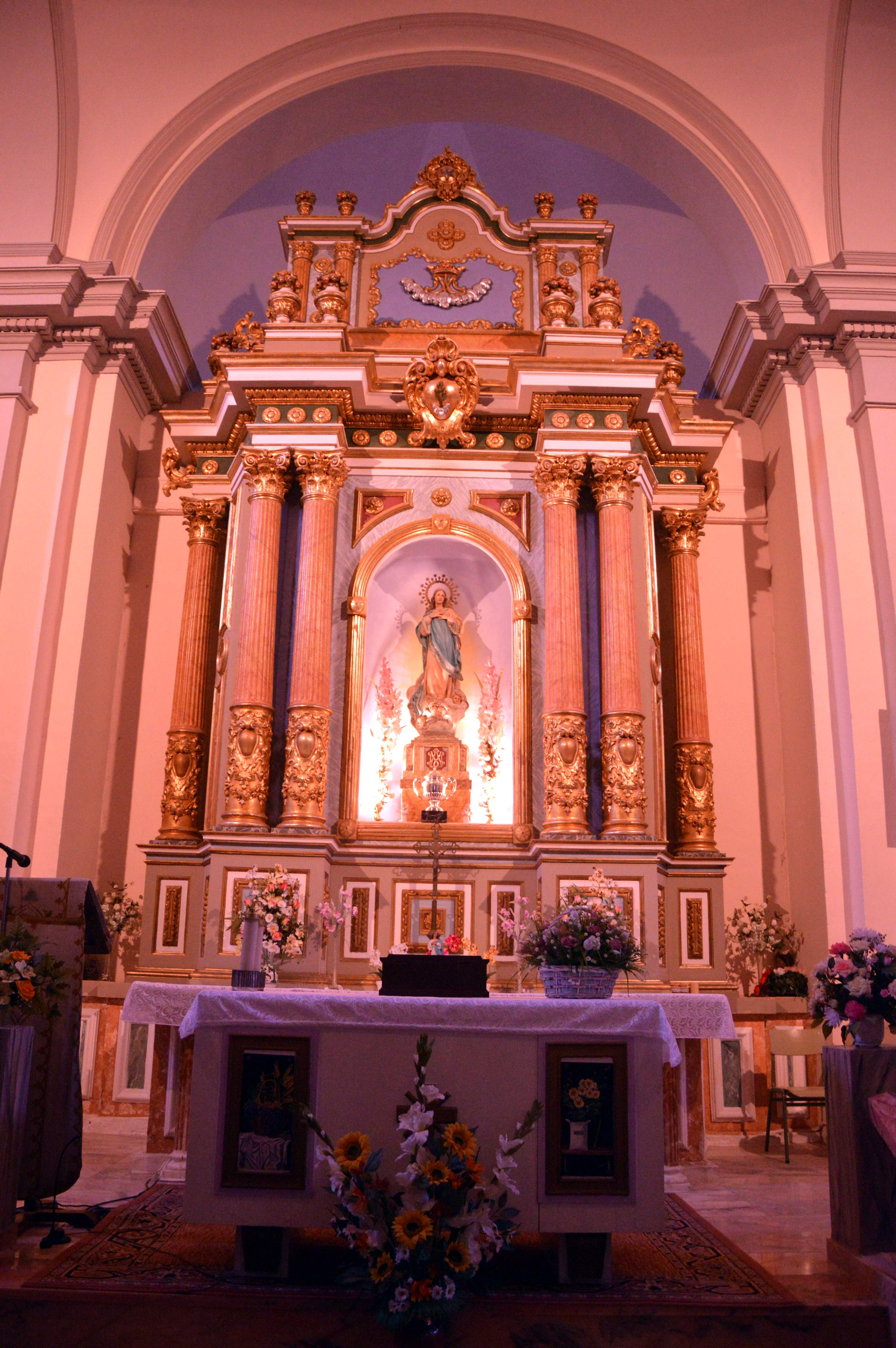 Detalle del retablo del altar mayor en la Ermita de la Purísima de Riodeva (Teruel), 2017.